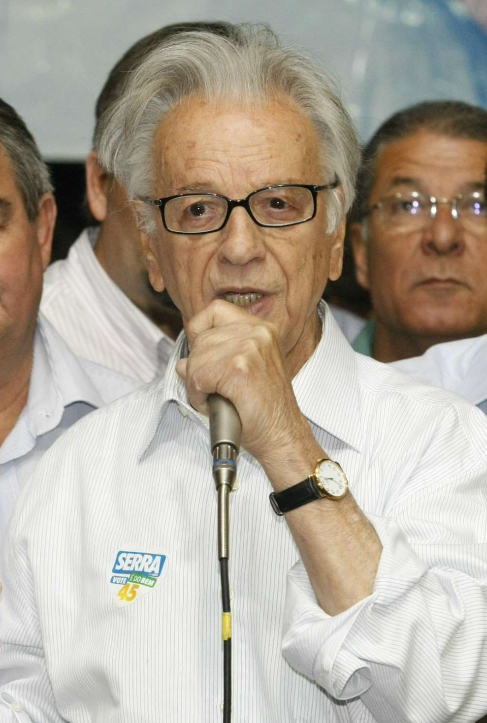 Itamar Franco discursa ao lado de José Serra e Aécio Neves em campanha ao Senado em 2010.